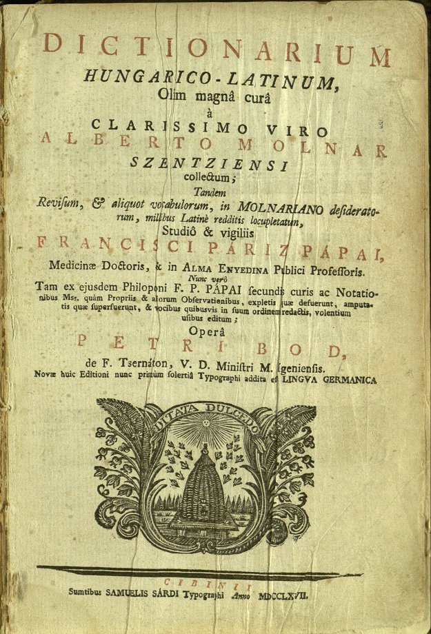 Dictionarium Hungarico-Latinum, Olim magnâ curâ à clarissimo viro Szenczi Molnár Albert (1574-1633) a magyar reformáció egyik legkiválóbb írója: prédikátor, szótárkészítő, költő, fordító, Pápai Páriz Ferenc (Dés, 1649. május 10. – Nagyenyed, 1716. szeptember 10.) tanár, az orvoslás és a filozófia doktora, és Bod Péter (Felsőcsernáton, 1712. február 22. – 1769. március 3.) református lelkész, irodalomtörténész közös műve.